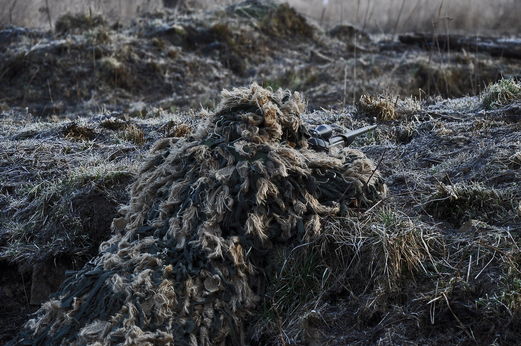 Ein Scharfschütze in Stellung.